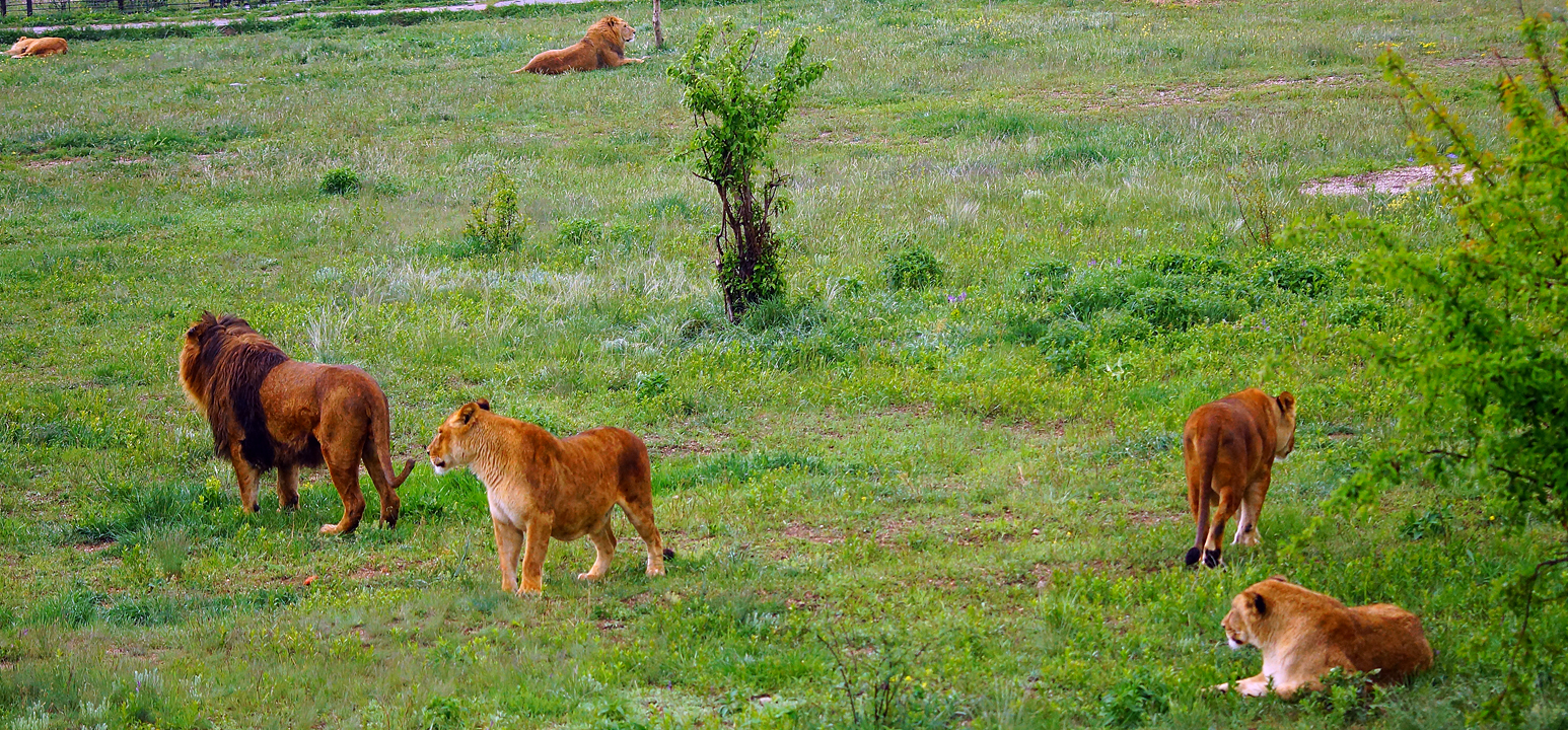 Львы в сафари-парке Тайган